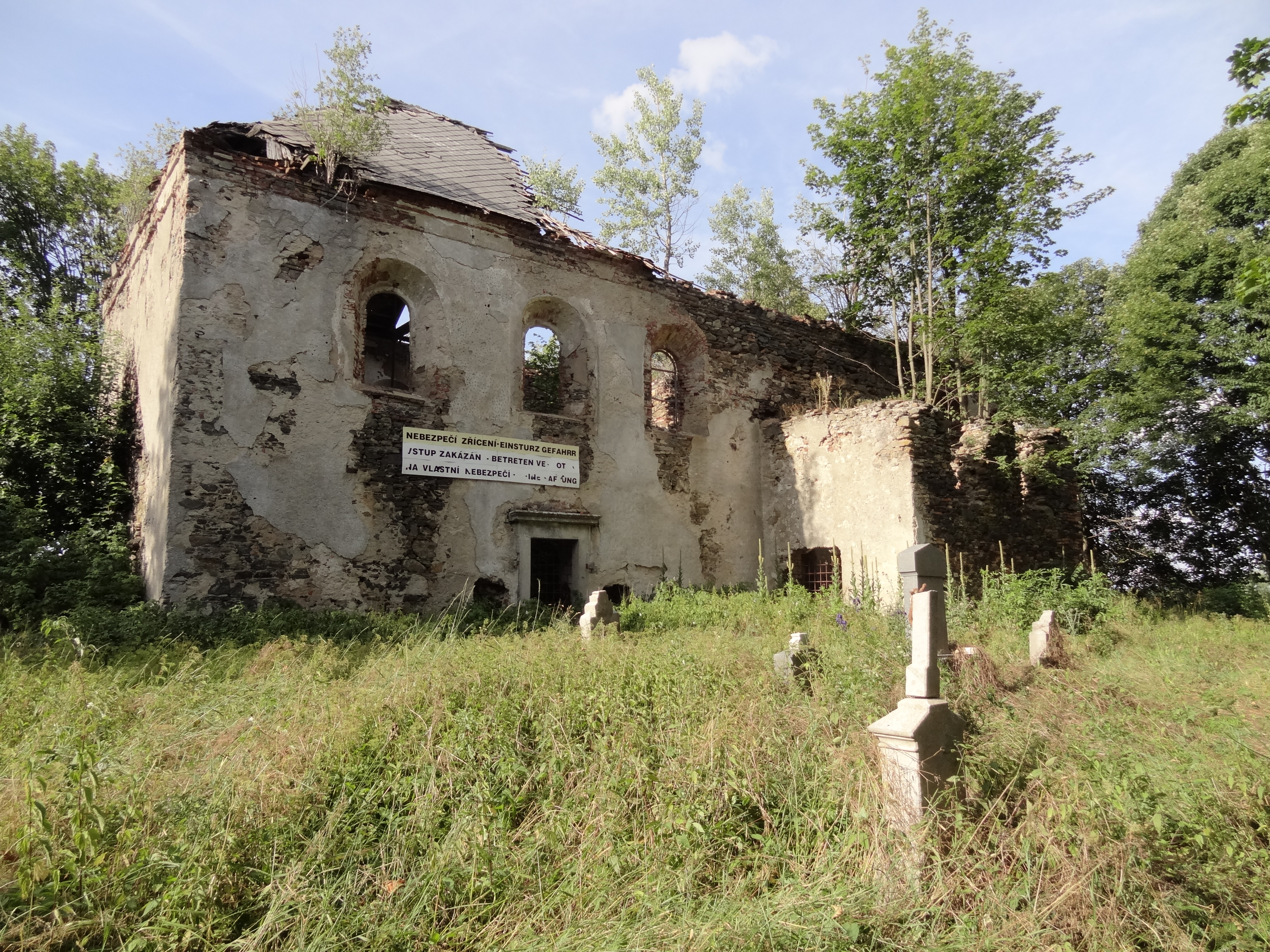 Kostel svaté Anny, Pořejov.